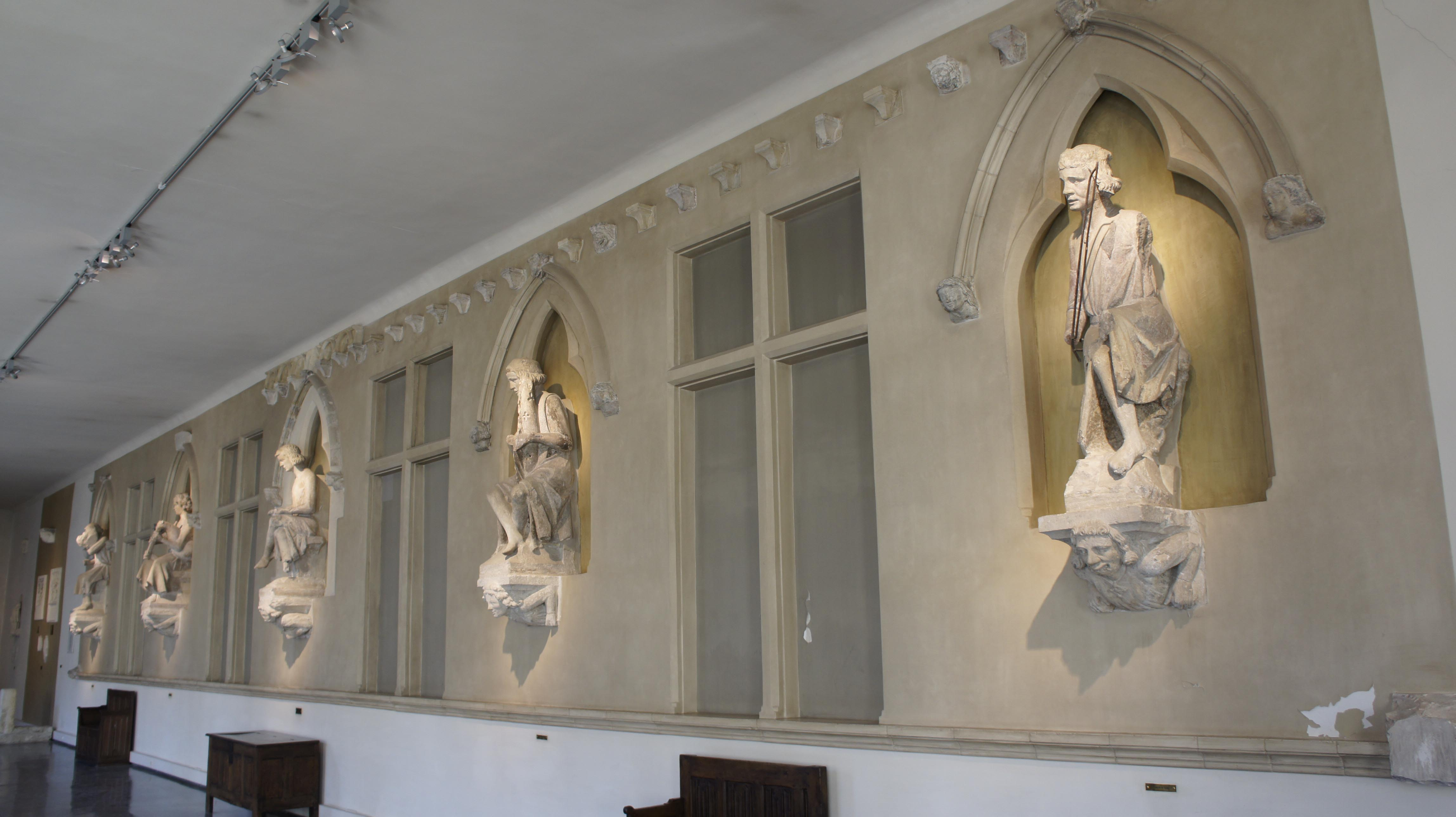 vue de la façade de la Maison des comtes de champagne avec les musiciens, elle fut mise en sureté dans le musée st-Rémi après la Première Guerre mondiale.